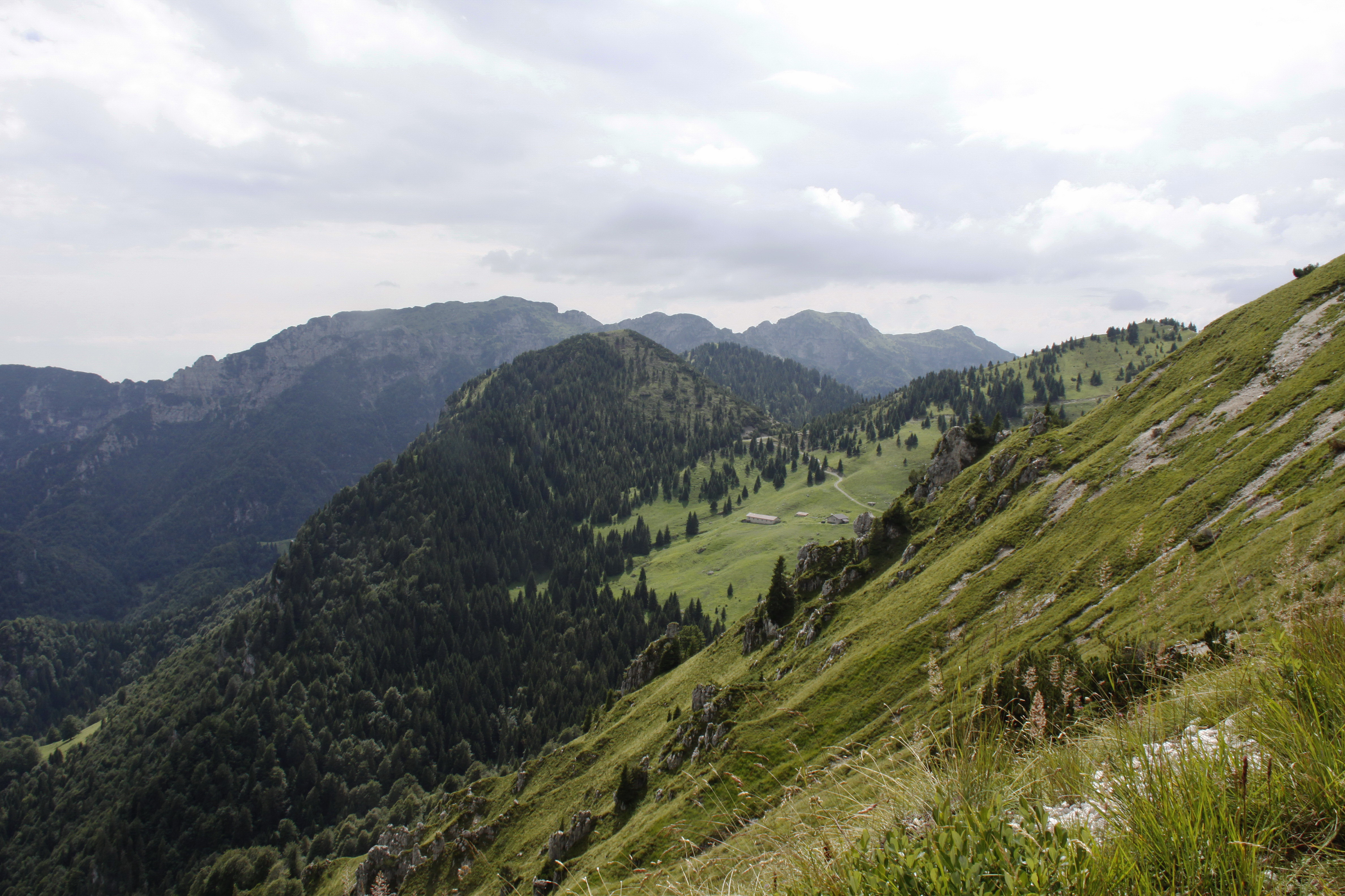 Monti Tremalzo e Tombea (Q47486355)